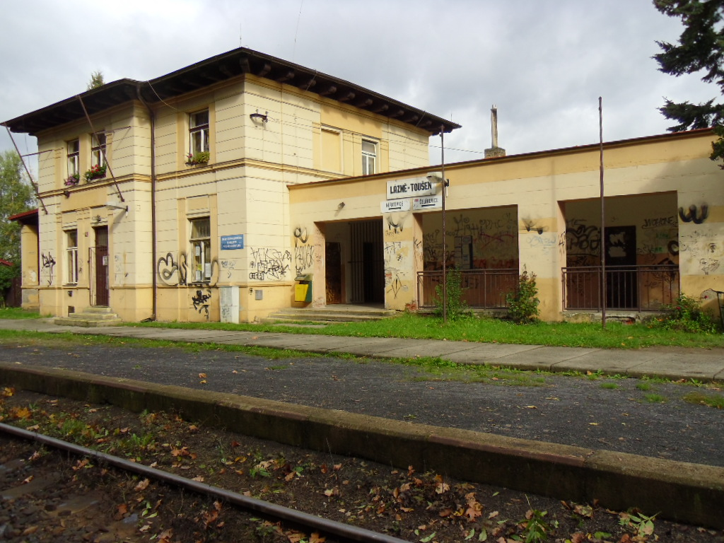 V současnosti je nádrží zavřené a pomalu chátrá. I když je stále obydlované třemi ženami a jednou z nich jsem já autorka této fotografie.